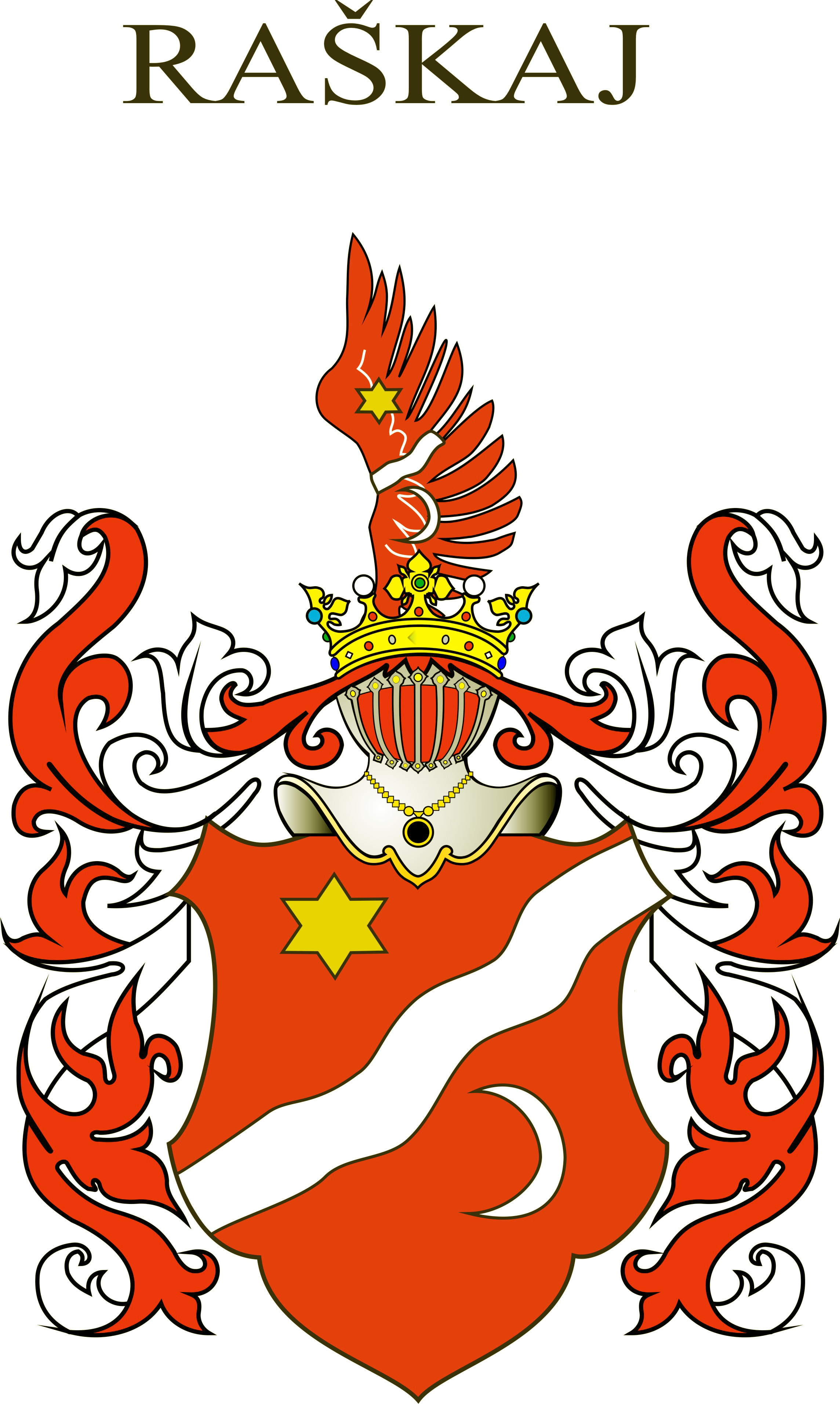 Grb obitelji Raškaj - Alojzija Raškaja, bilježnika na Ozlju.